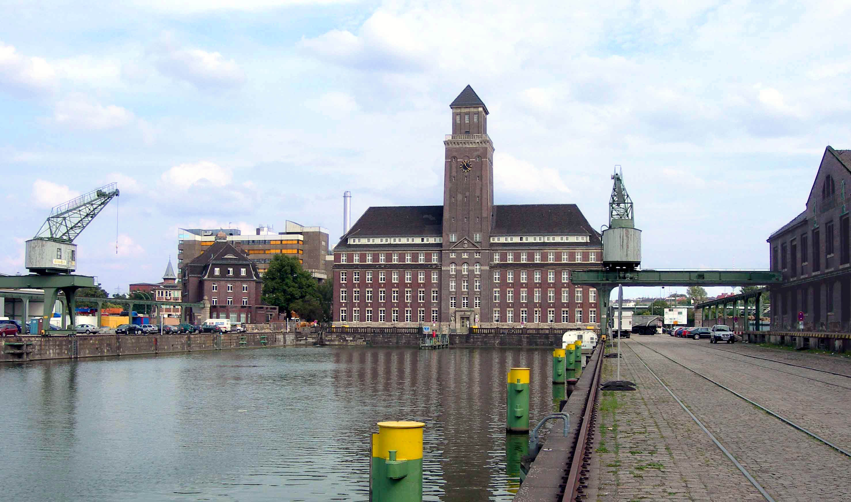 Westhafen (Berlin) Administration Building